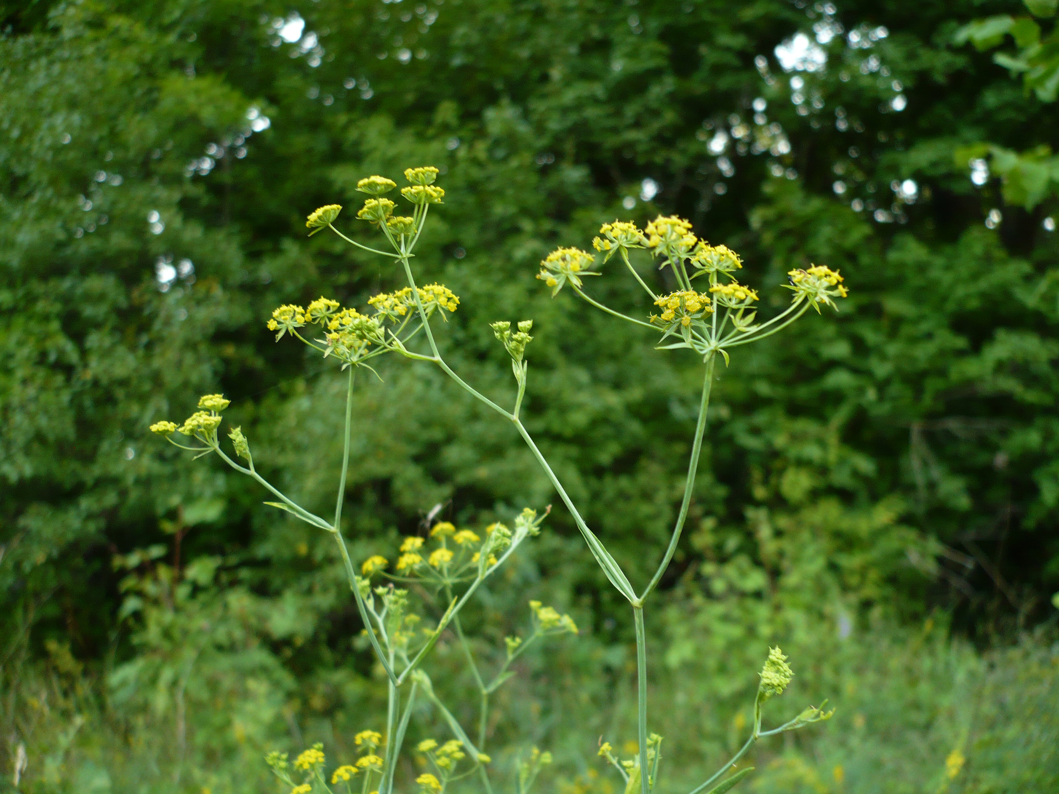 Володушка козелецелистная. Балка Пёстрая, Шебекинский район Белгородской области.